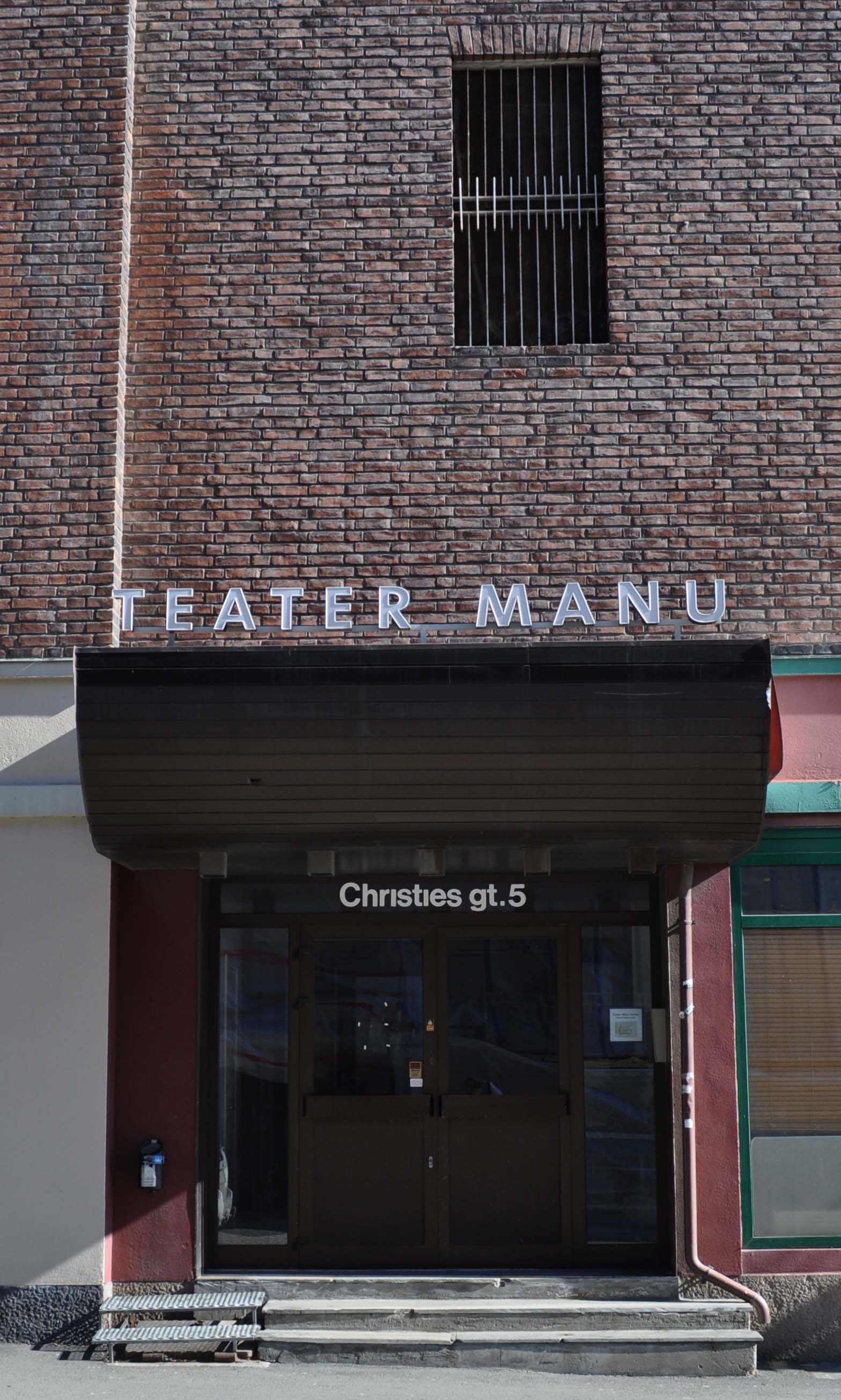 Teater Manu